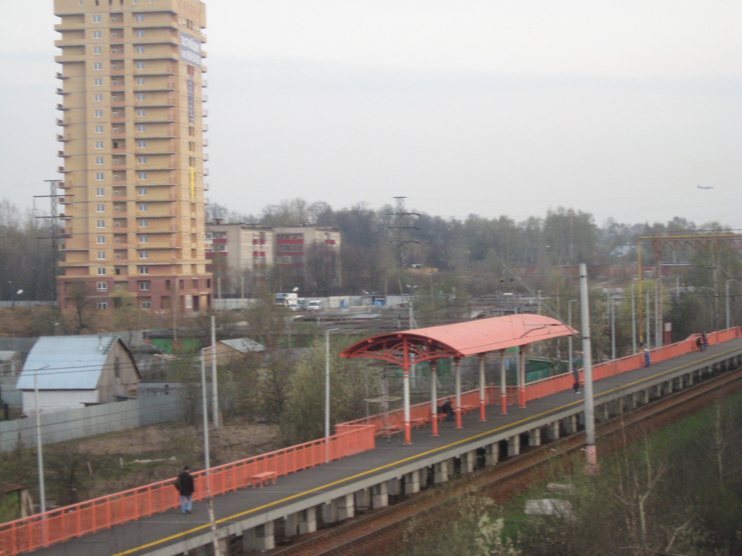 Платформа Депо (Савёловское направление)